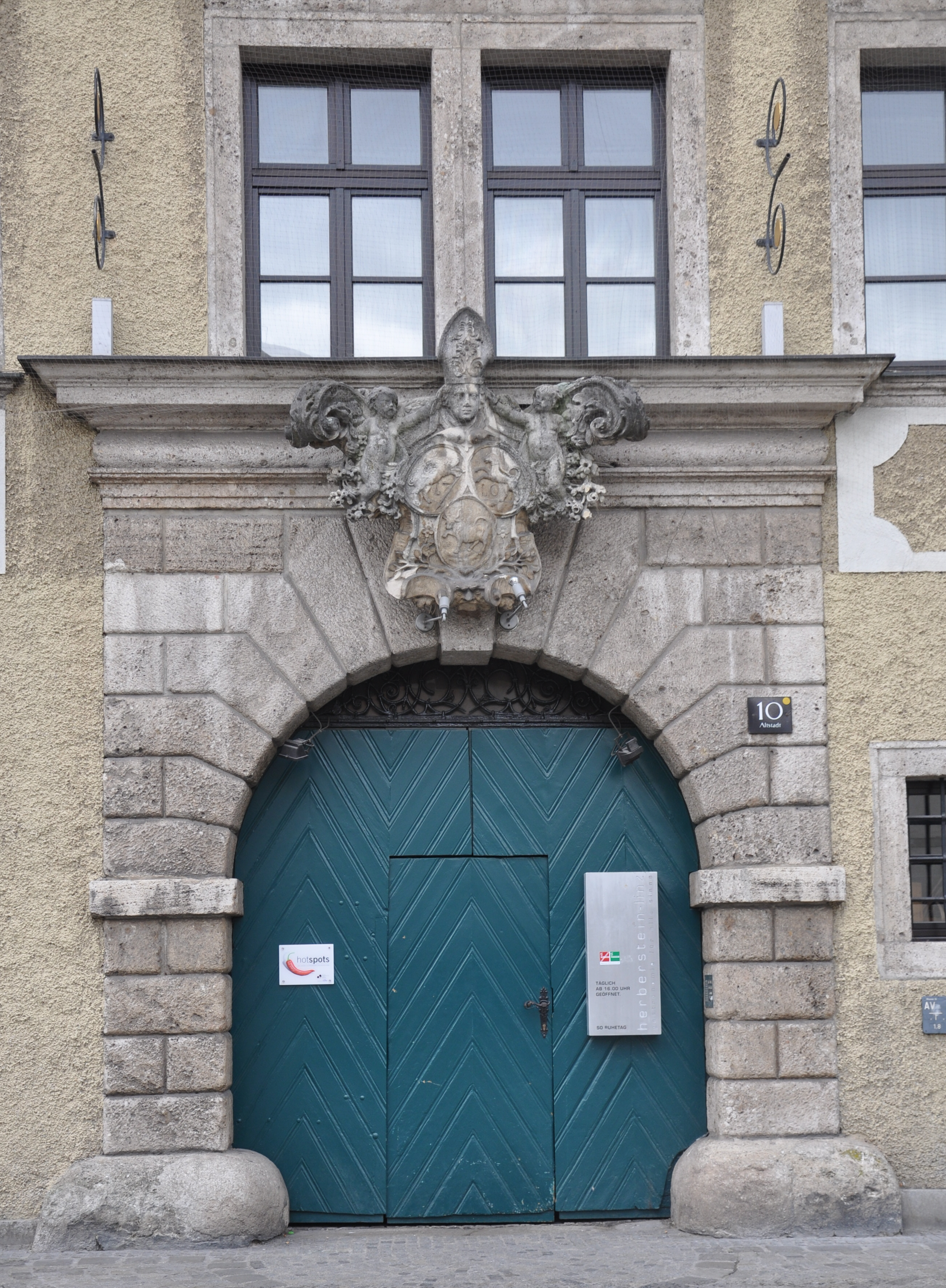 Kremsmünstererhaus (Stifthaus des Stifts Kremsmünster), Altstadt 10, Linz Portal mit Wappen